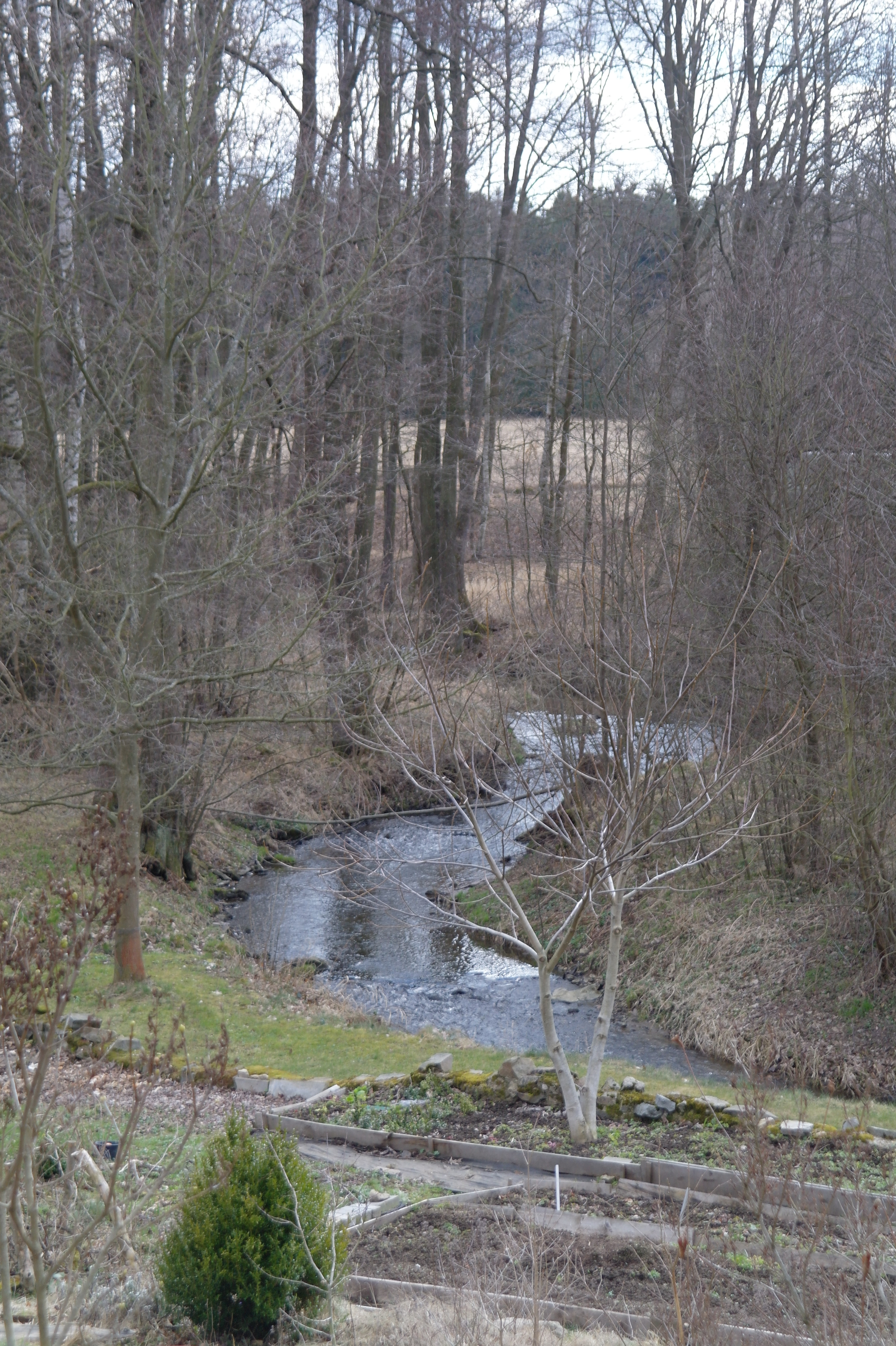 Rejta, Svinenský potok